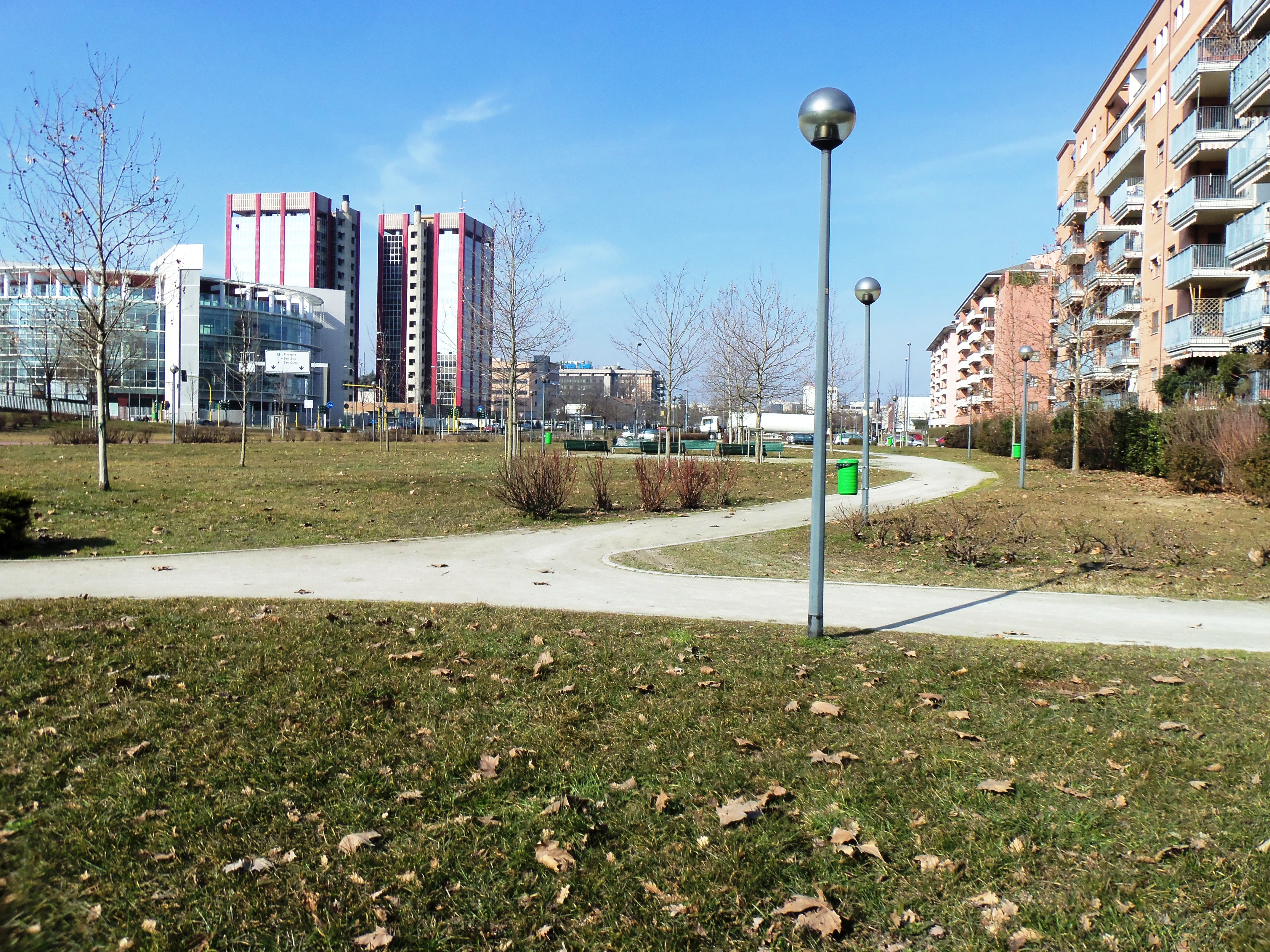 Milano, giardino Gonin Giordani